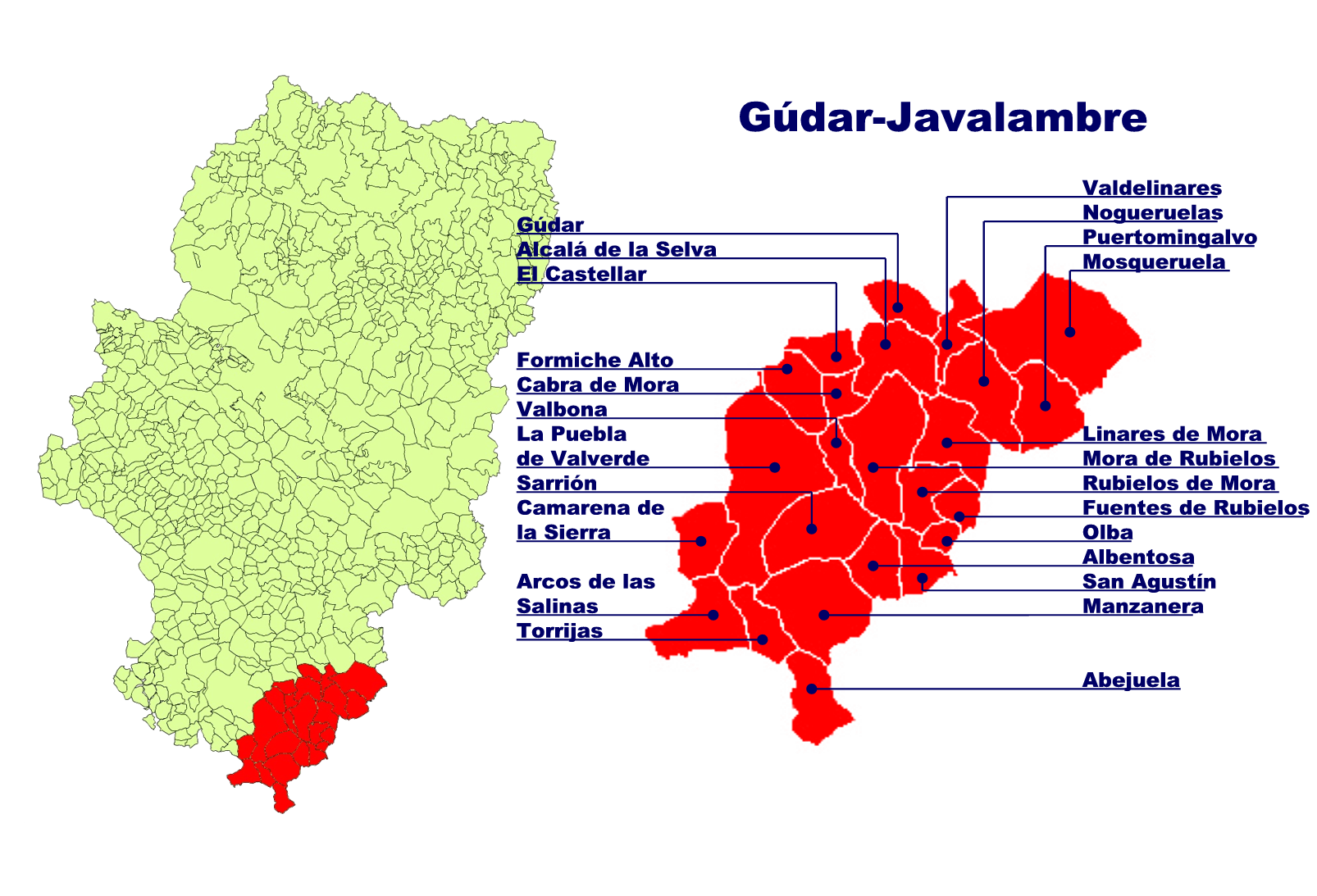 Comarca de Gúdar-Javalambre Creado el 01.11.2005 por Ecelan en base a Image:Aragon municipalities.png